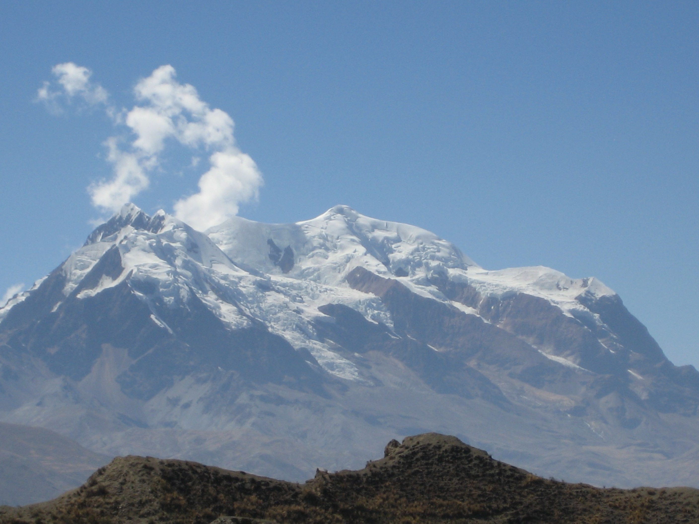 Nevado Illimani (Bolivia) desde Rio Abajo